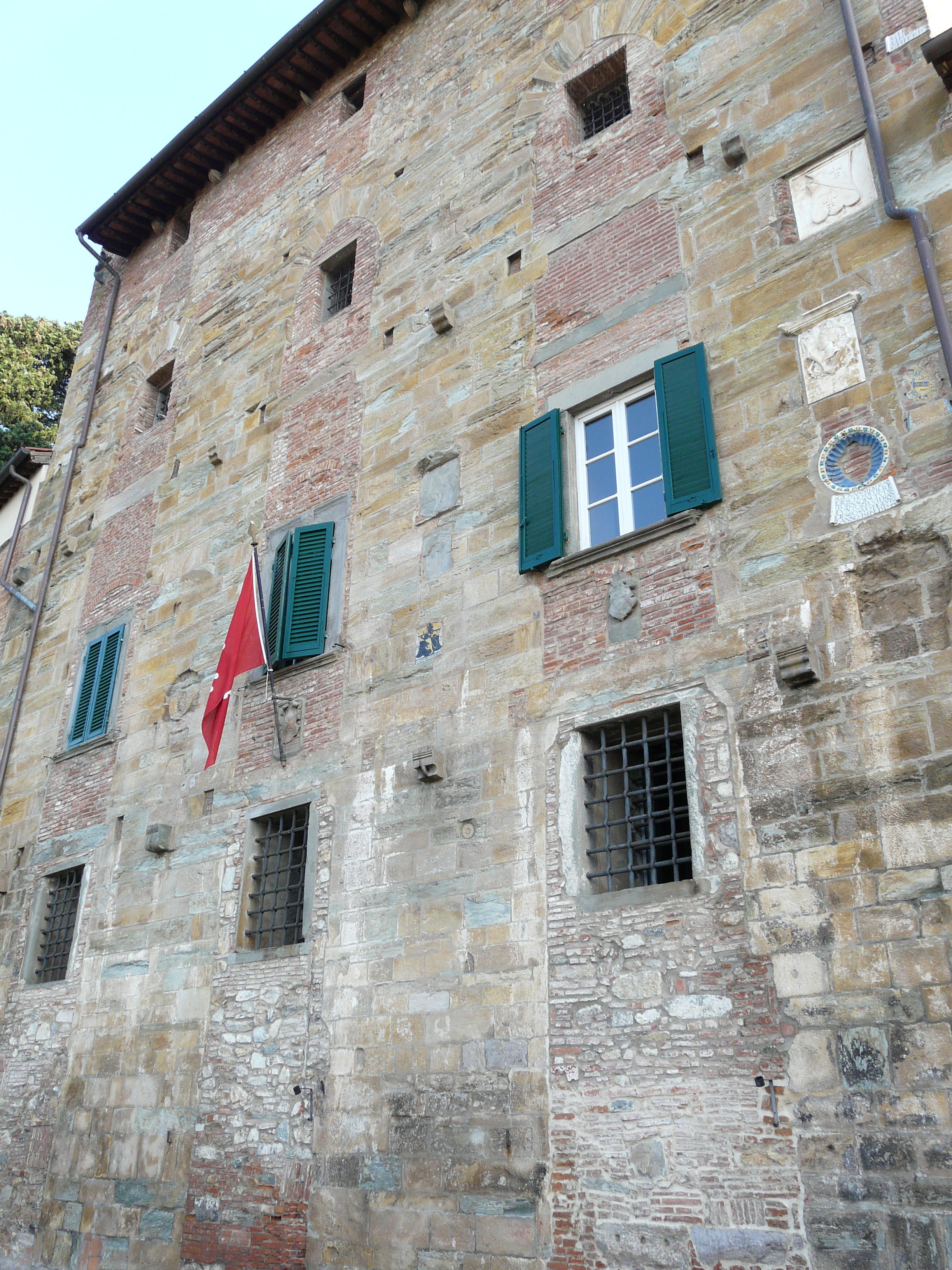 Palazzo Pretorio, Comune di Vicopisano, Toscana, Italia